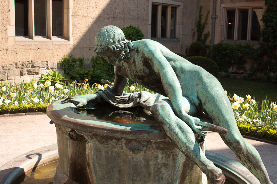 פסל בחצר ארמון צציליינהוף